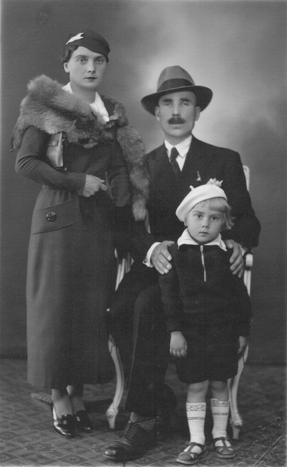 В. И. Бабияк в детстве со своими родителями - В. К. Бабьяк (Булыгой) и И. Г. Бабьяком. Кишинёв. 1935 год. Фото из домашнего архива семьи Бабияк